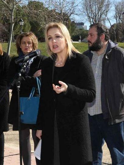 La ciudad de Madrid cuenta desde hoy con un monolito de homenaje a todas las personas donantes de órganos y a los profesionales de trasplantes. La inauguración ha tenido lugar este mediodía en el Parque Norte del distrito de Fuencarral-El Pardo, en un acto al que han asistido el concejal del distrito, Guillermo Zapata; el director de Relaciones Institucionales de la Federación de Enfermos y Trasplantados Hepáticos, Jesús Fargas; la directora de la Organización Nacional de Trasplantes, Beatriz Domínguez y representantes de los grupos políticos municipales.